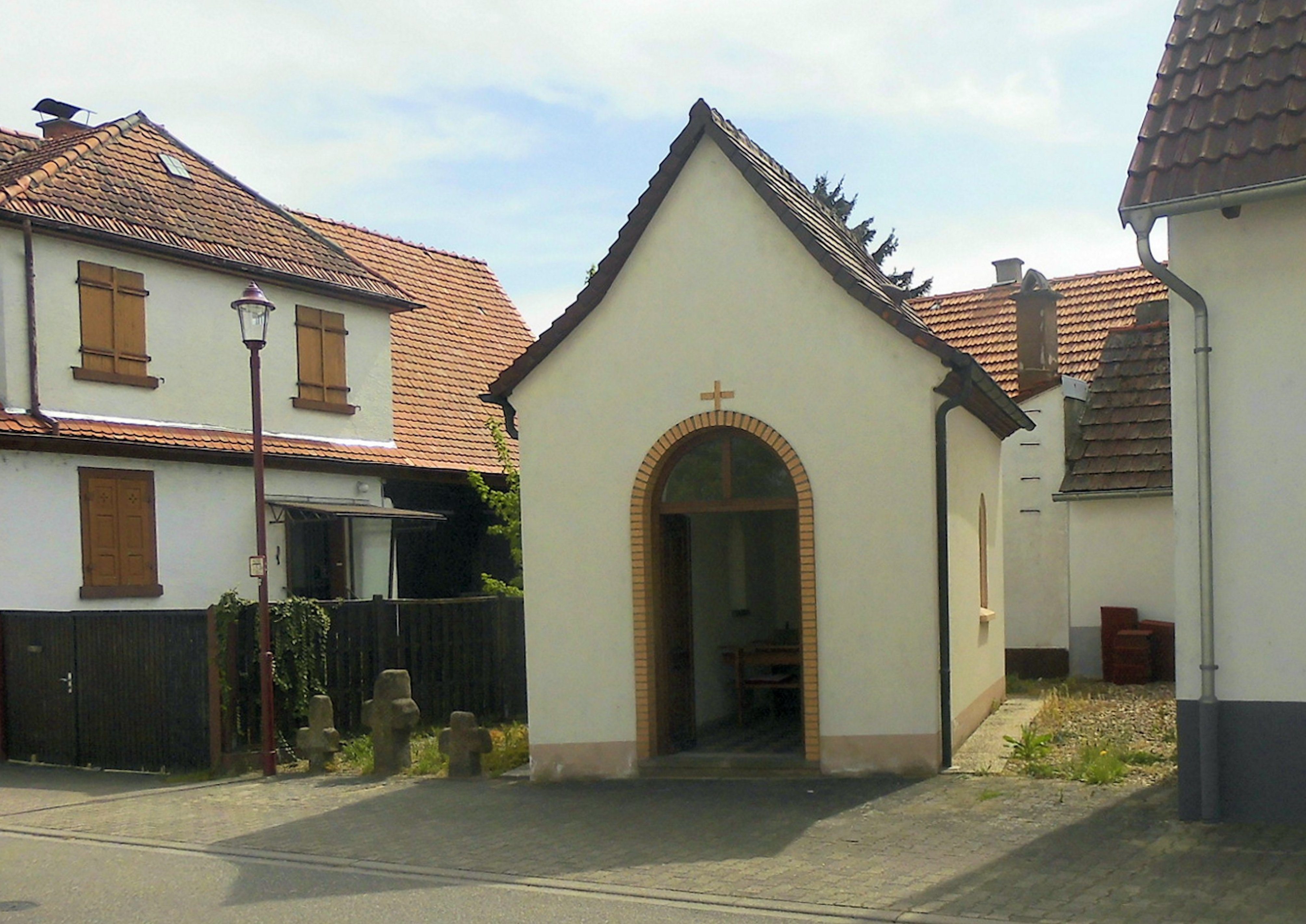 St. Leonardus-Kapelle in Kronau, Landkreis Karlsruhe